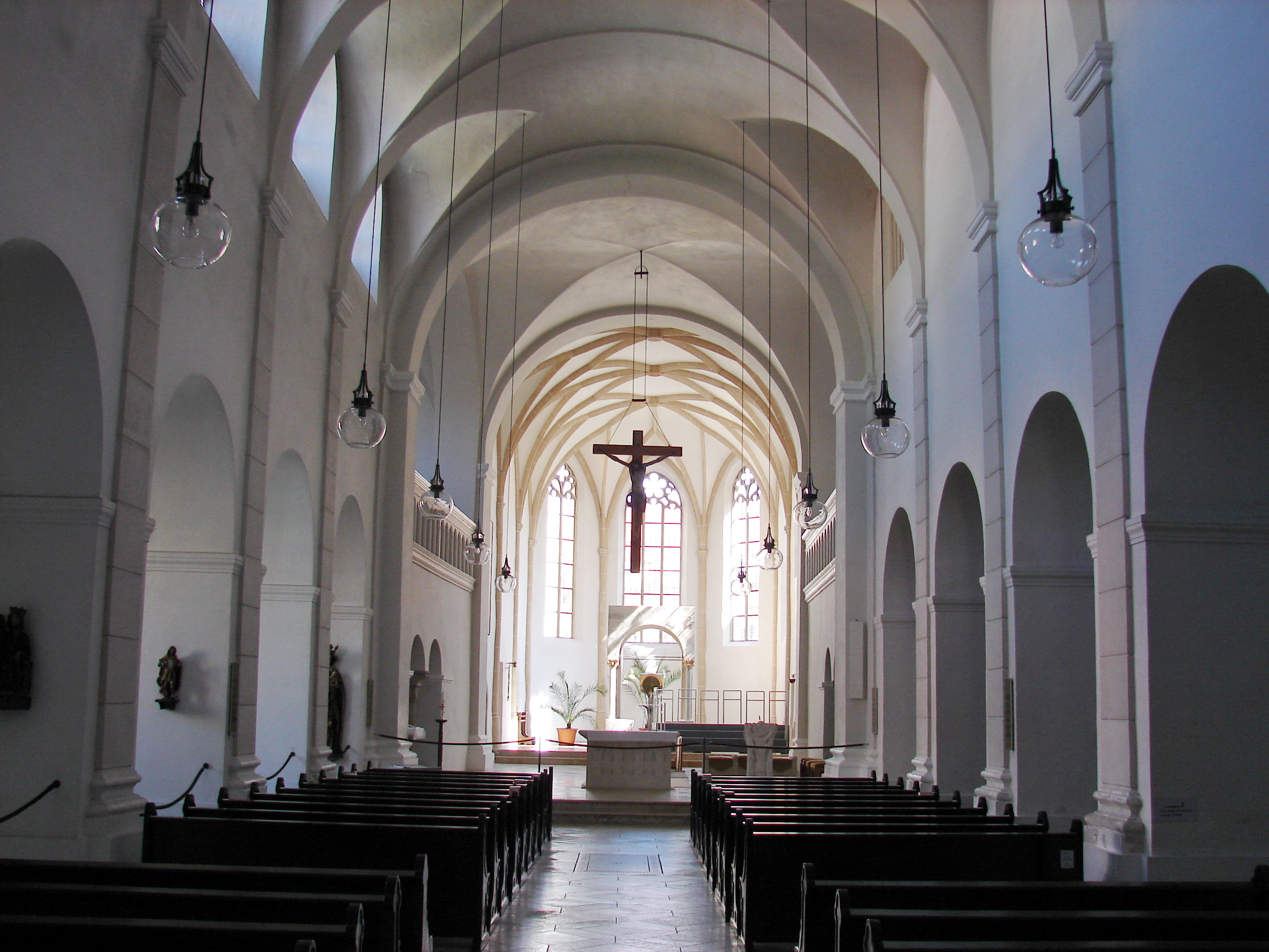 Das Kloster Niedernburg Passau ist eine ehemalige Abtei der Benediktinerinnen und heutiges Kloster der Englischen Fräulein in der Altstadt von Passau in Bayern im Bistum Passau.